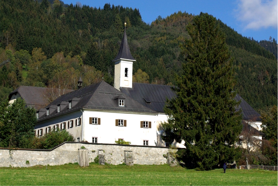 Gesamtanlage Caritasanstalt St. Anton